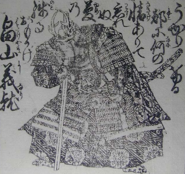 yoshinari_hatakeyama